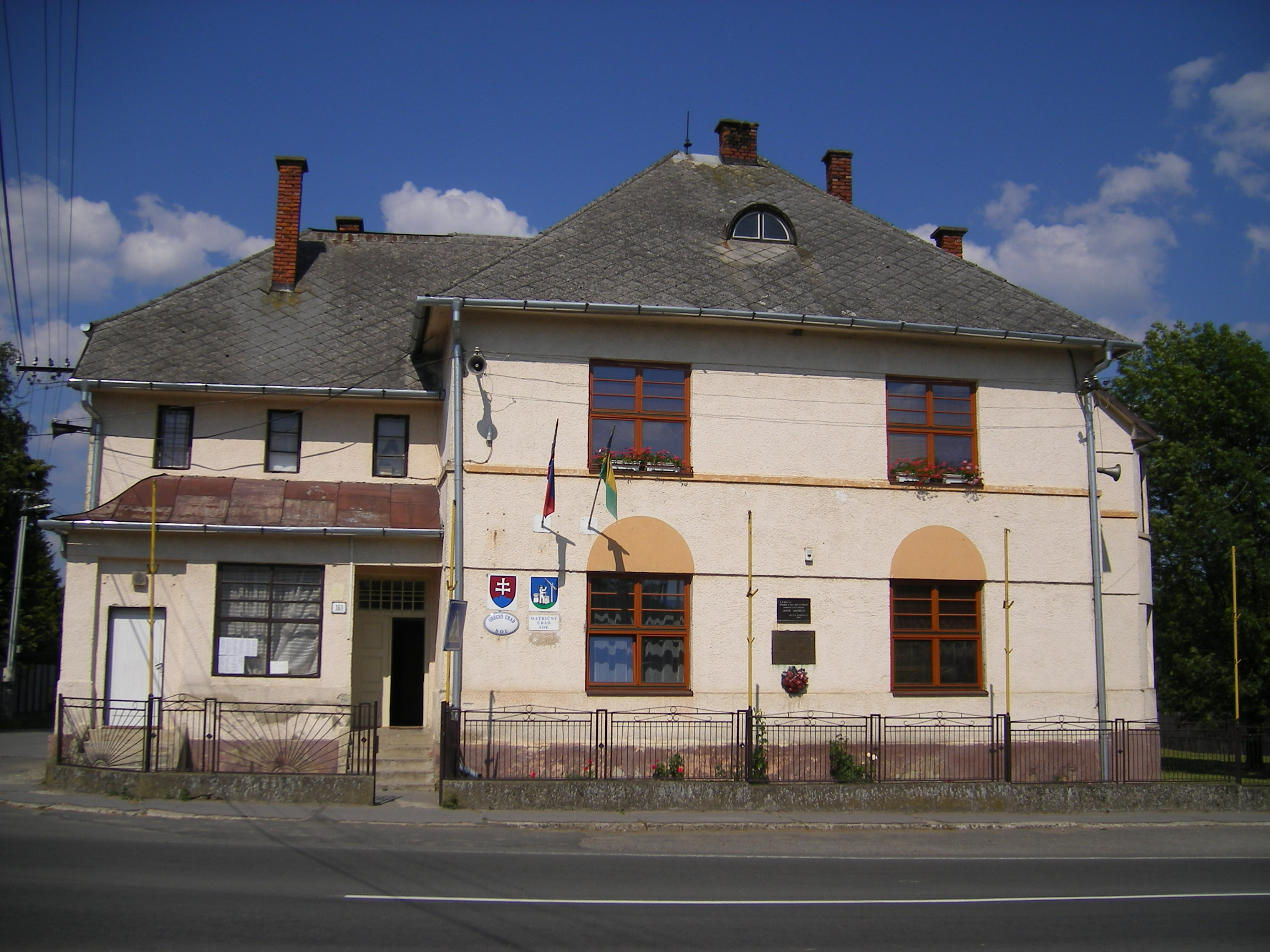 Soľ, okres Vranov nad Topľou, obecný úrad